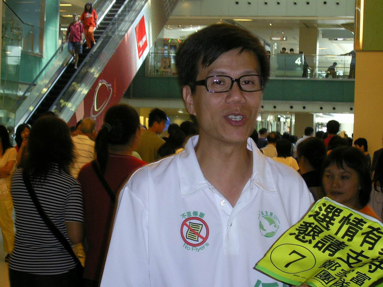 中文（香港）: 鄭家富